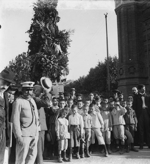 Monument a Rafael Casanova